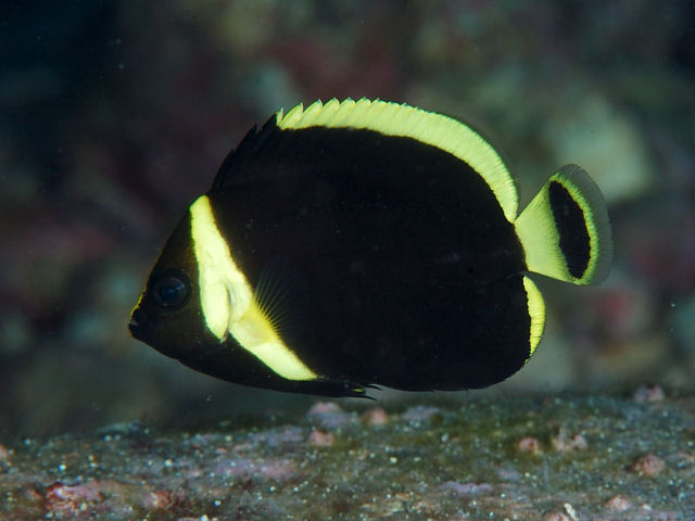 キヘリキンチャクダイ Chaetodontoplus melanosoma